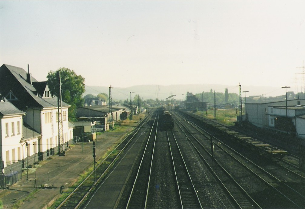 Der Bahnhof Trier-West im Oktober 1994. Ein von 181204 gezogender Güterzug hat den Bahnhof gerade Richtung Trier-Zewen durchquert.